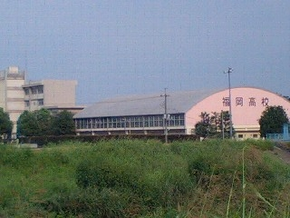 ふじみ野市福岡新田より新河岸川越しに埼玉県立福岡高等学校を撮影。